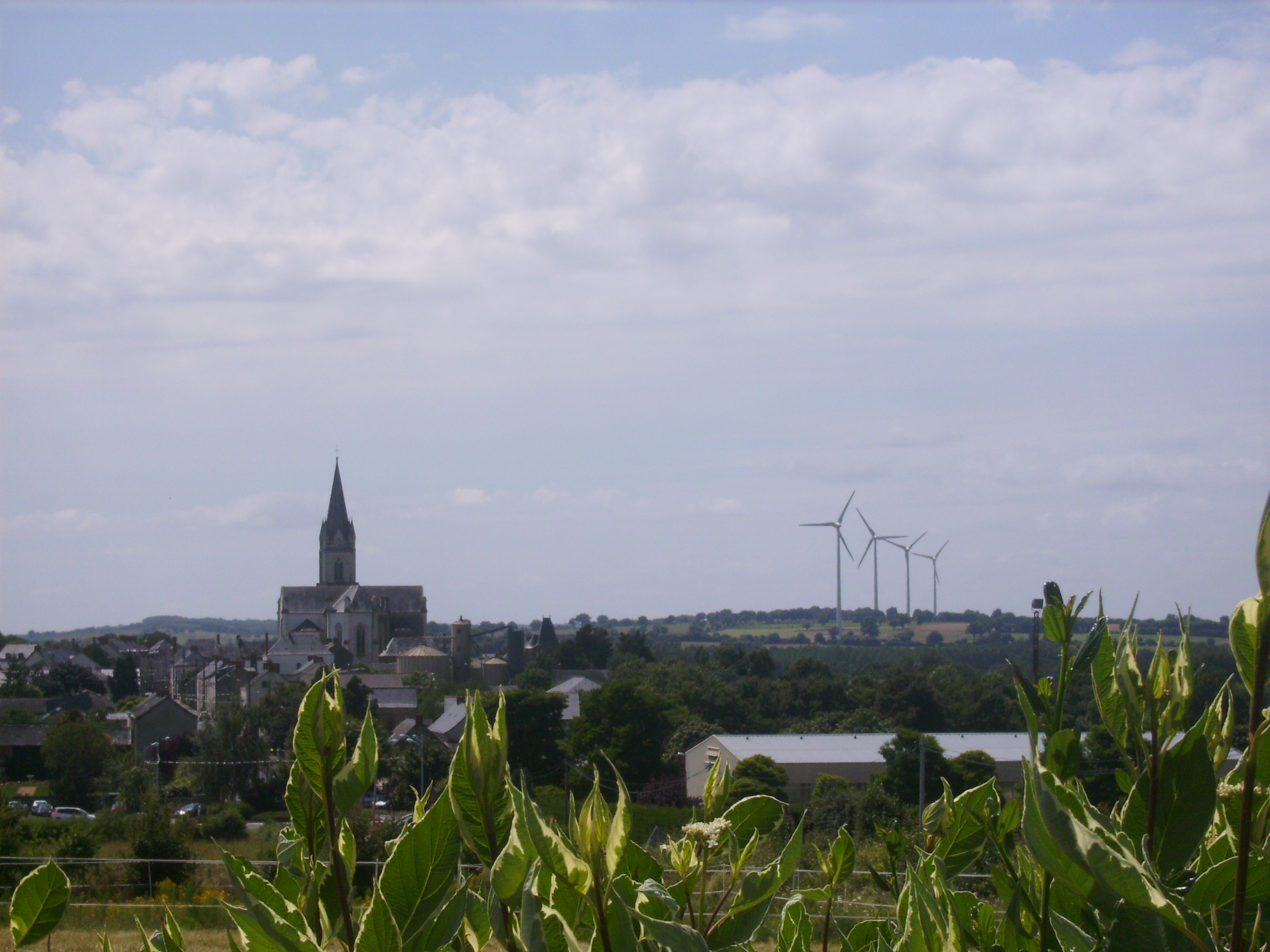 le village de Freigné (49) et ses éoliennes vus de la route de Candé